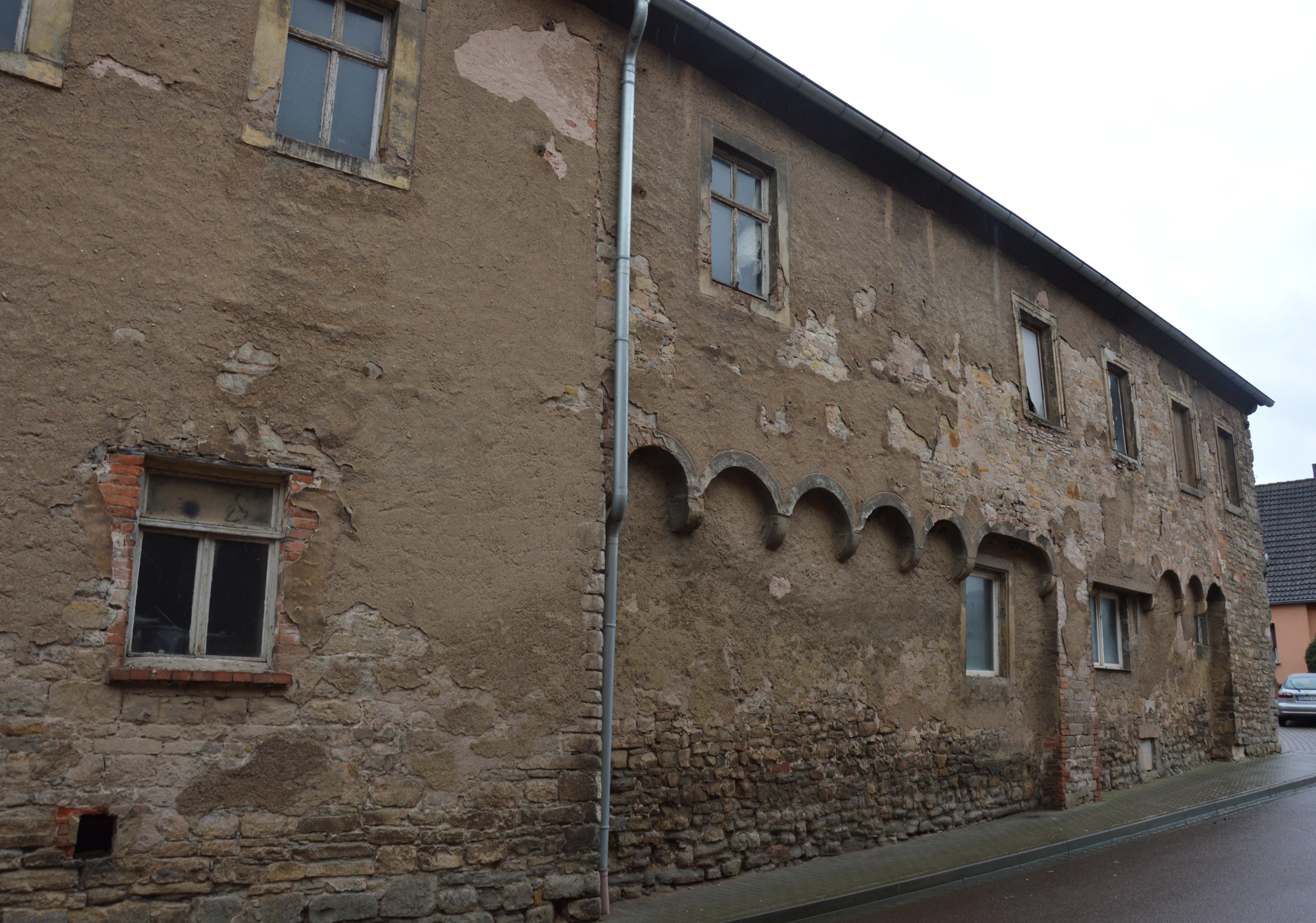 Rittergut in Heiligenthal